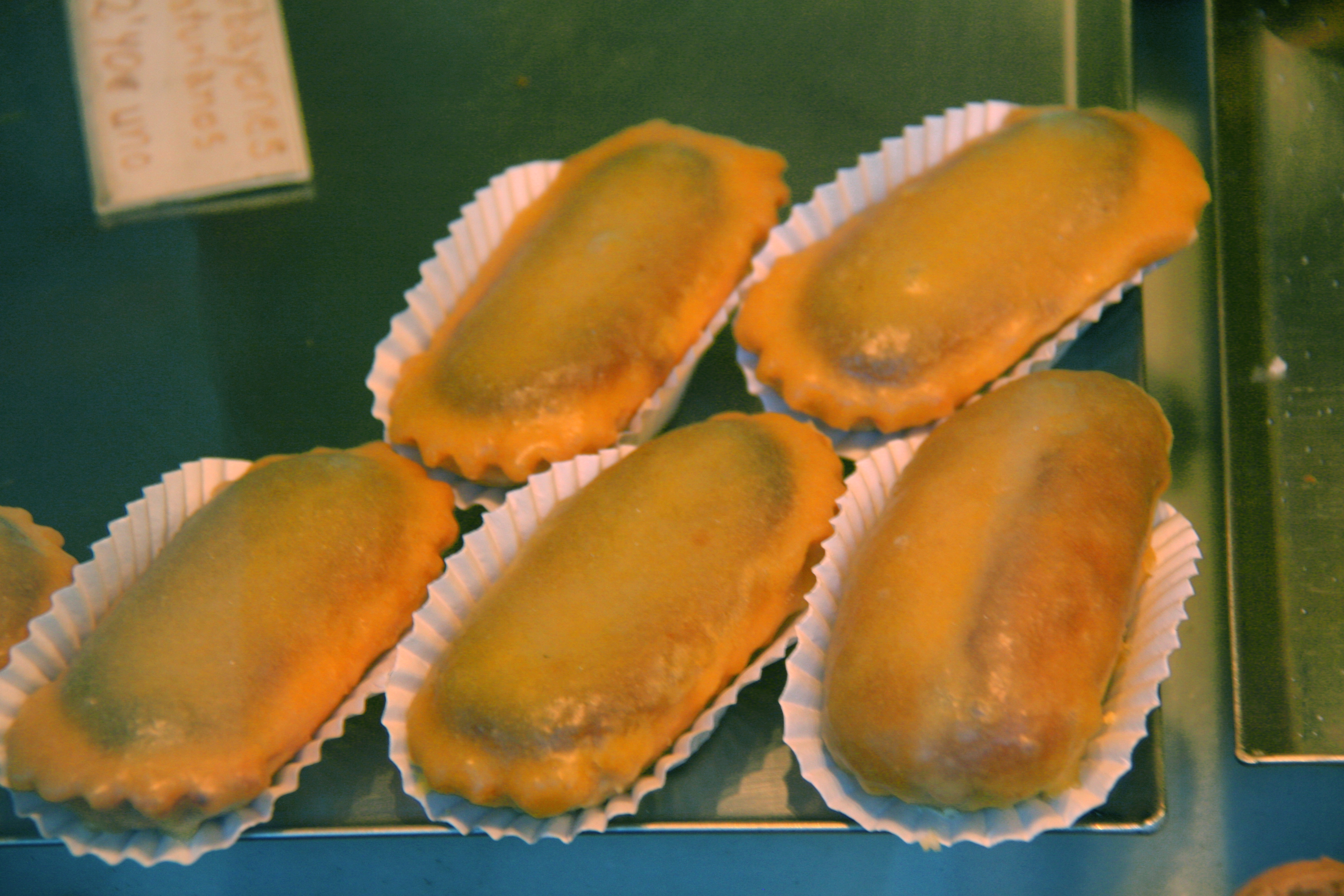 Carbayones